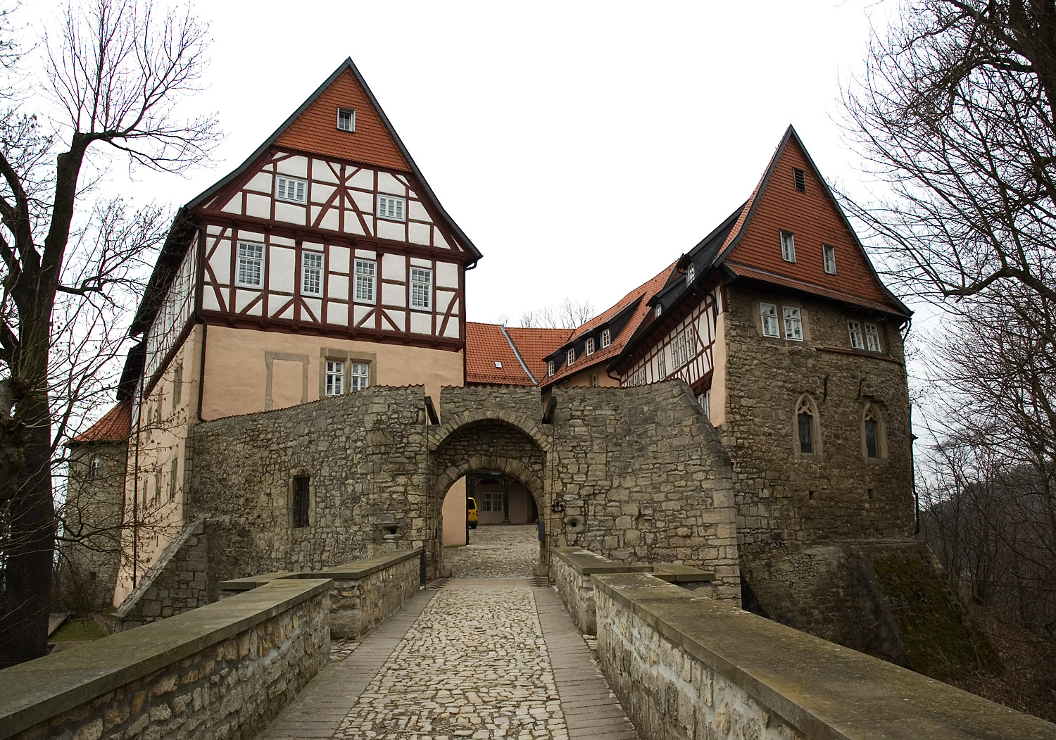 Castle Bodenstein, entrance, Germany